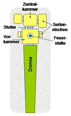 Sas Concas